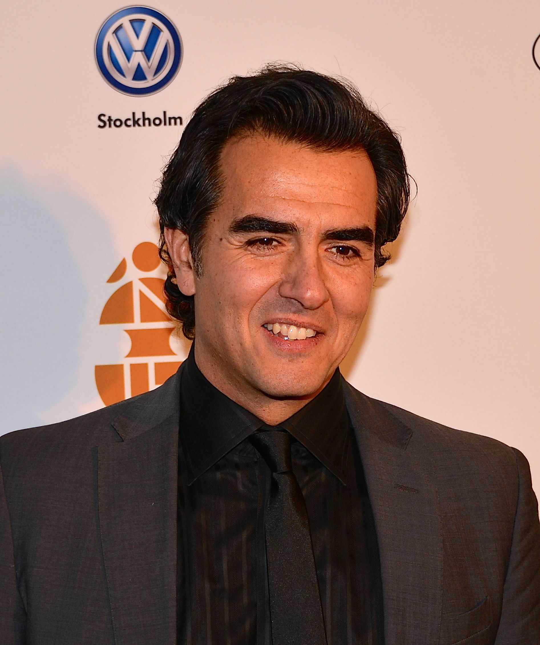 Rafael Edholm på Guldbaggegalan den 21 januari 2013.